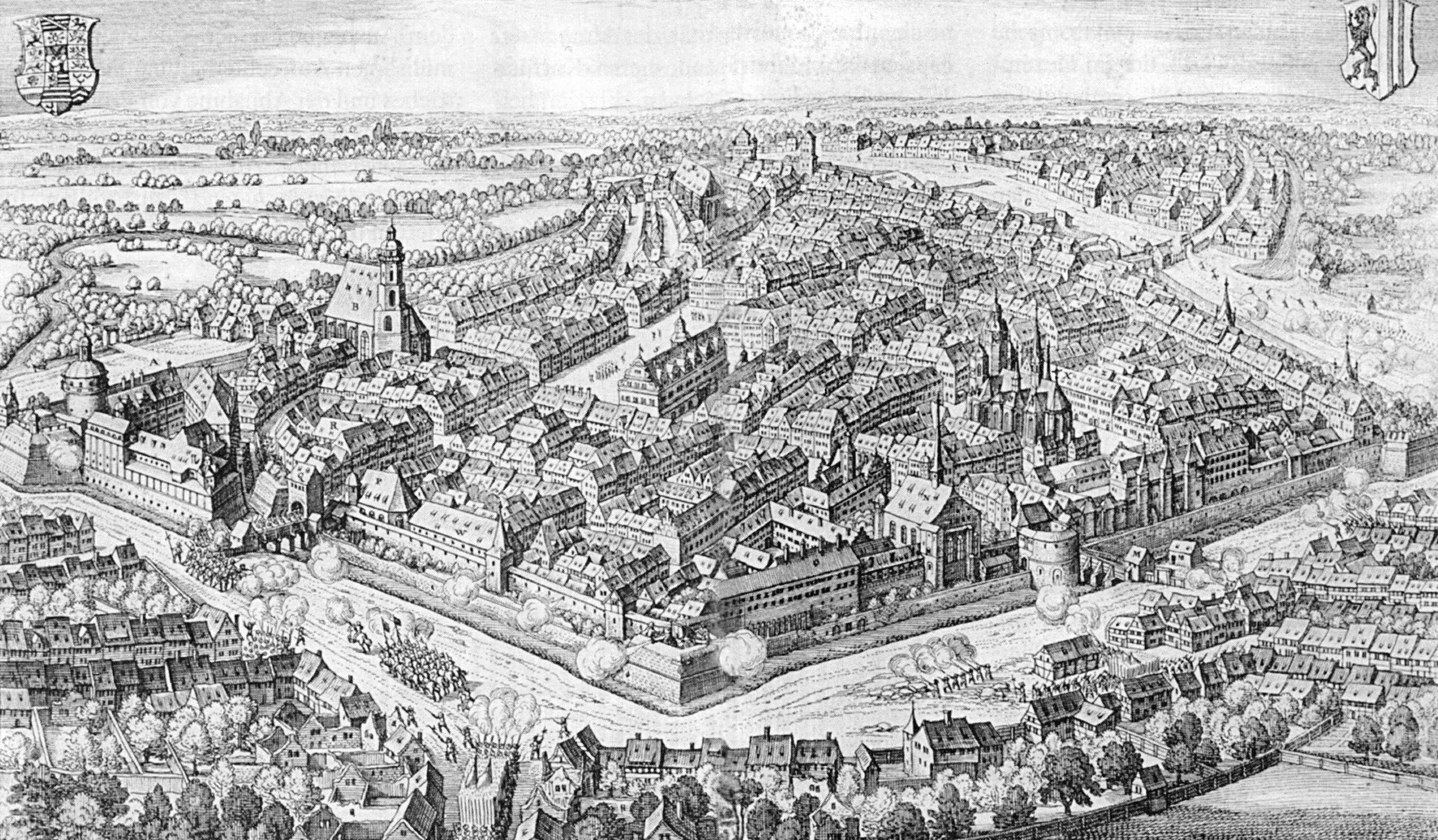 Belagerung Leipzigs 1632 durch Holk, Blick aus südöstlicher Richtung